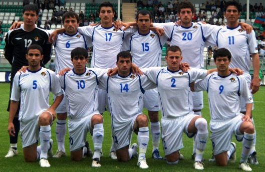 Молодежная сборная Азербайджана